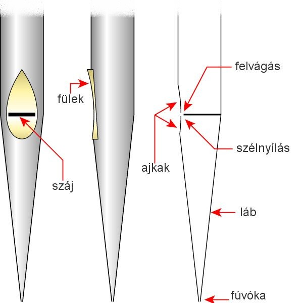 Ajaksíp sémája